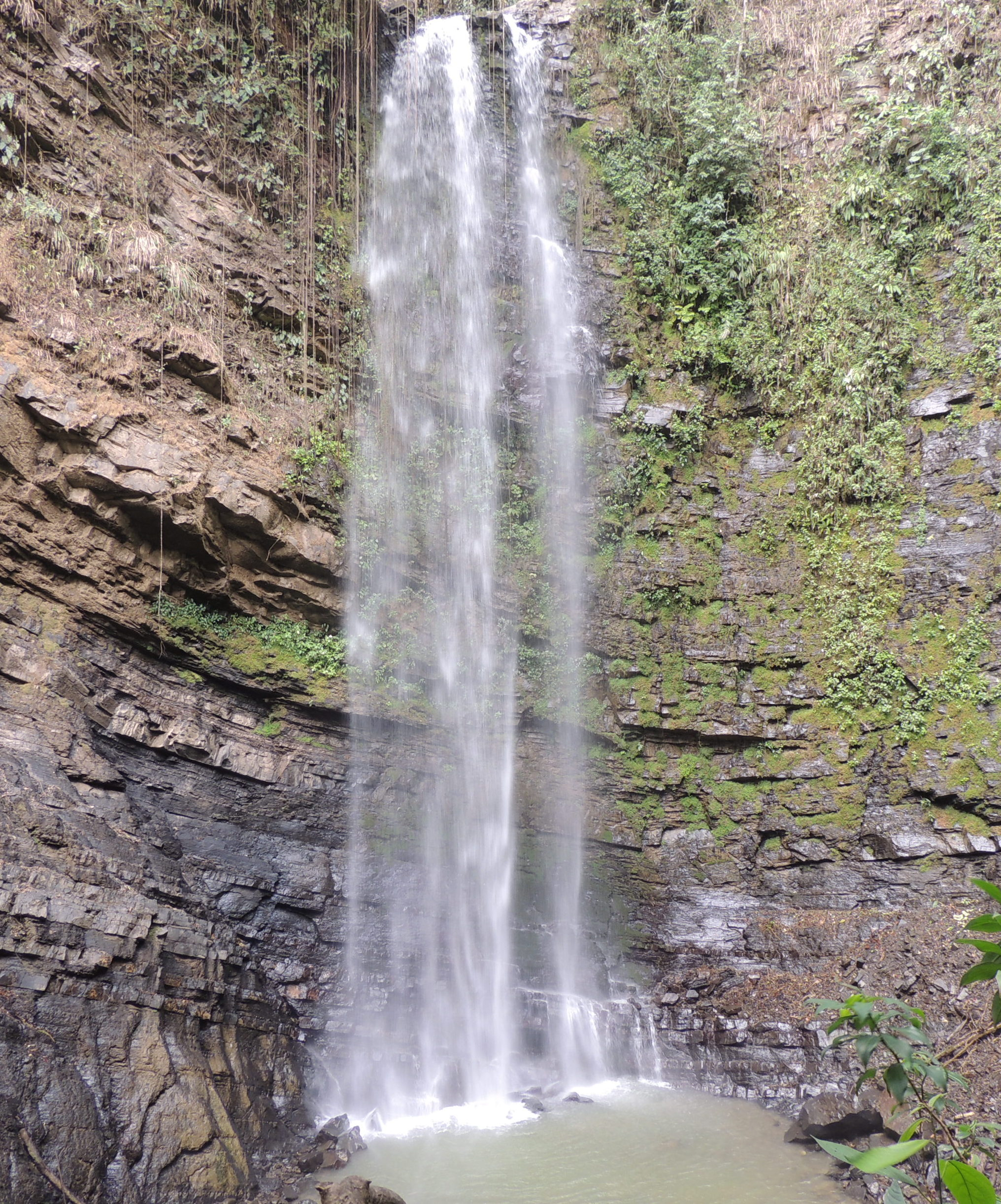 Ubicado sobre la formación Rio Guache, es el mas impresionante de los accidentes geográficos presentes en el cauce del río Maria